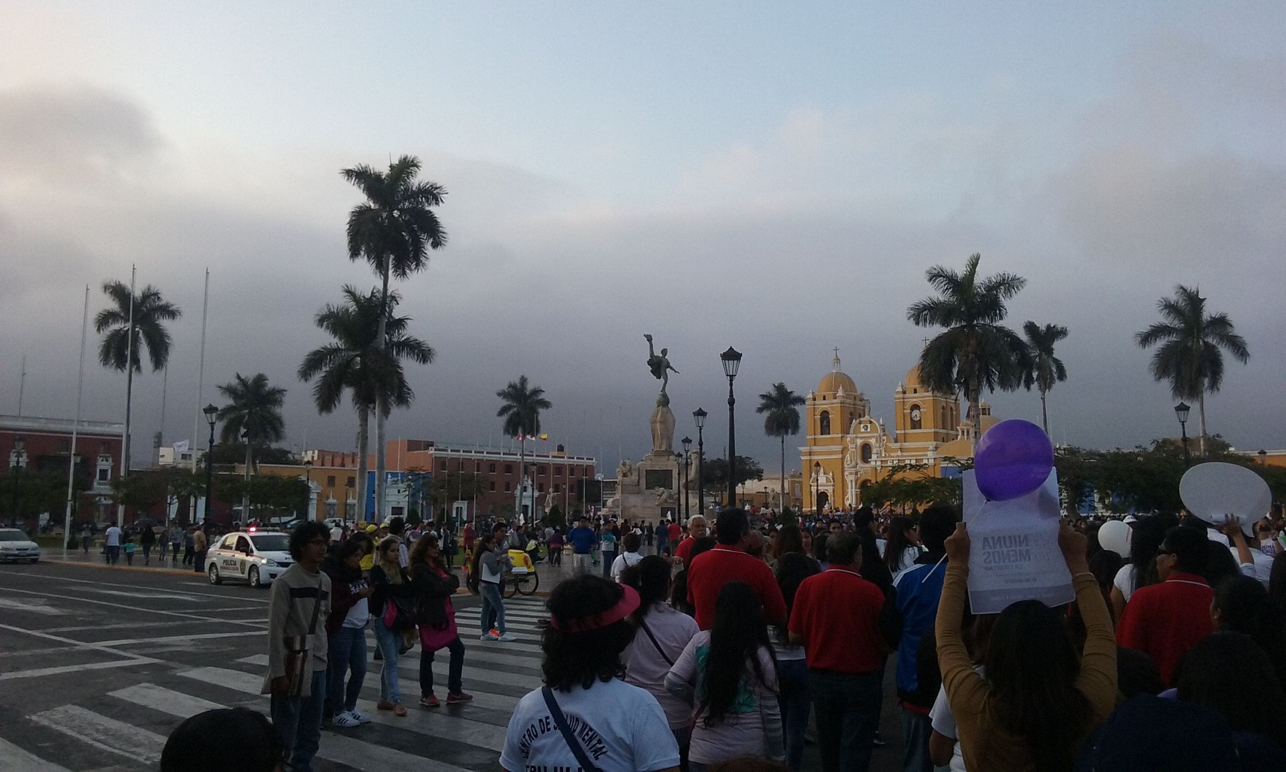 La Plaza de Armas de Trujillo, Perú, durante la marcha #NiUnaMenos contra la violencia a la mujer.